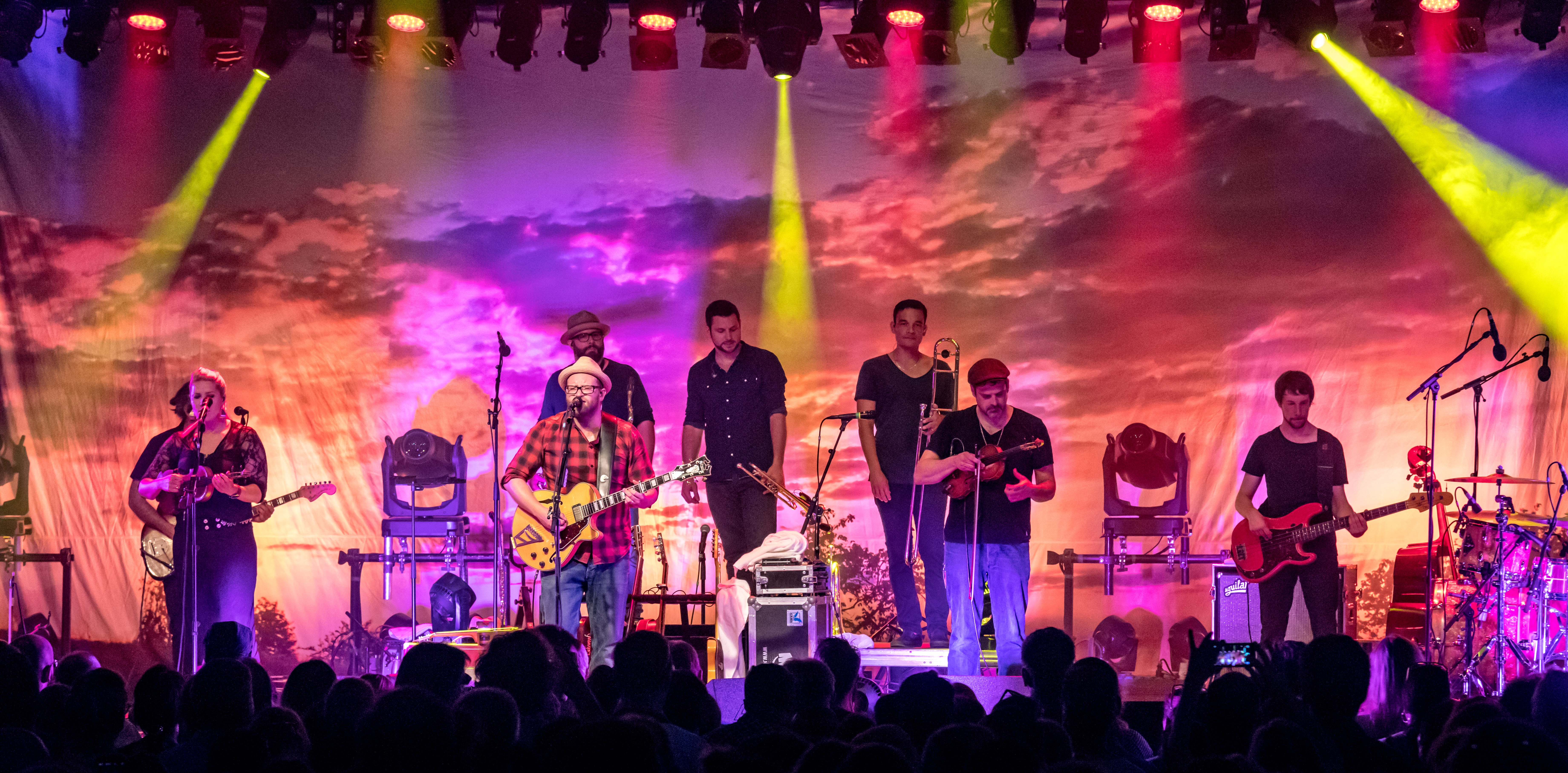 Bilder vom Zelt Musik Festival 2017 in Freiburg im Breisgau Gregor Meyle am 16-07-2017